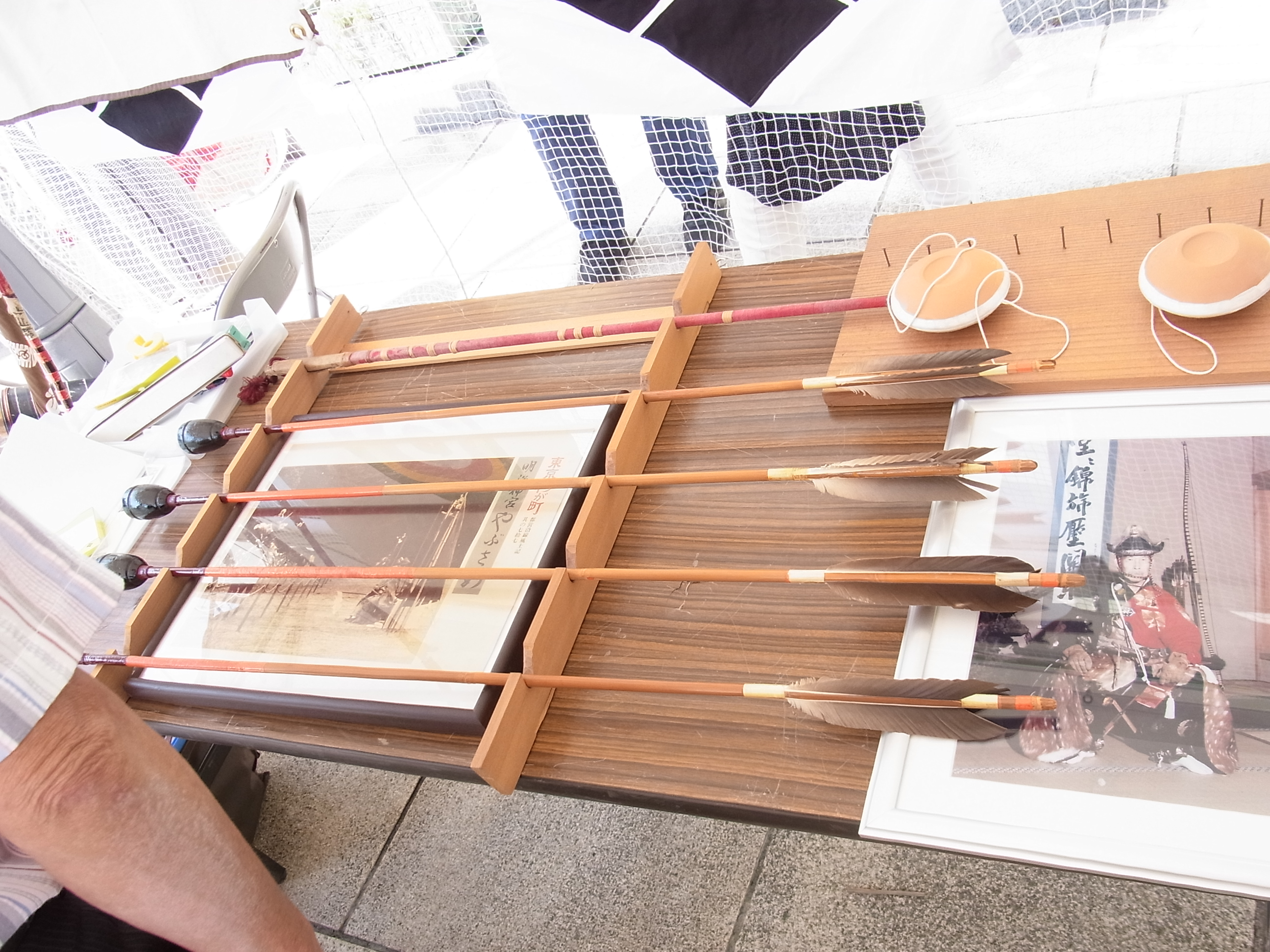 R0034334 鏑矢